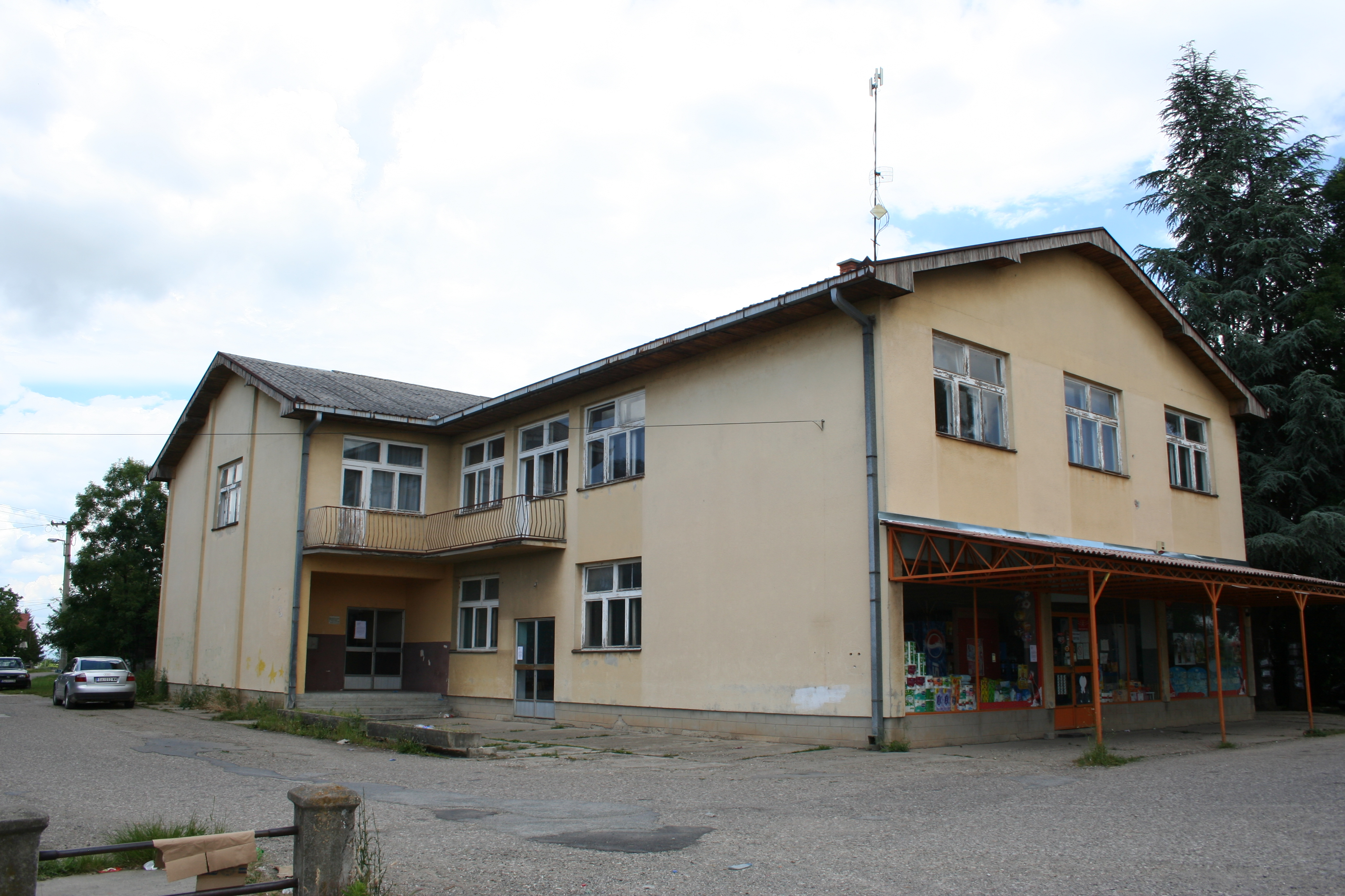 Dom kulture, Skupljen opština Vladimirci